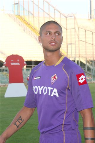 Il calciatore durante la presentazione della nuova squadra allo stadio comunale di Firenze